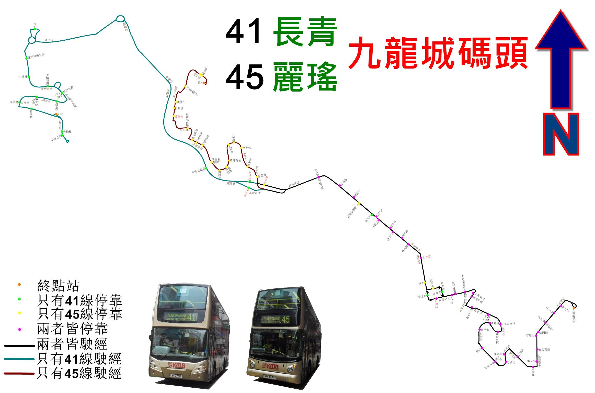 中文（香港）: 九巴41線及45線的走線圖，當中藍綠色表示只有41線駛經，而啡線則只有45線駛經